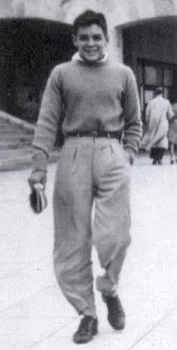 Ernesto Guevara. De vacaciones en Mar del Plata. Argentina. ca. 1945